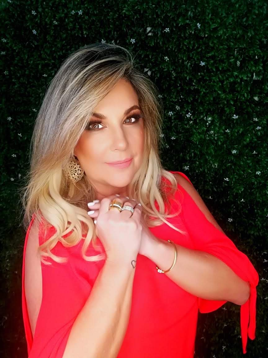 Imagen de la periodista Bibi Lando